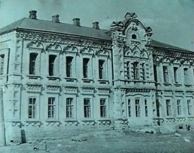 Келейная в Средне-Никольском монастыре, начало XX в.